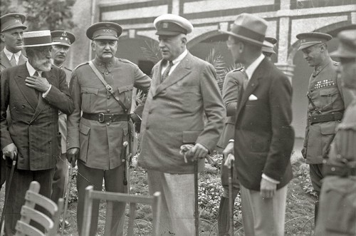 Miguel Primo de Rivera jenerala Donostian. 1927